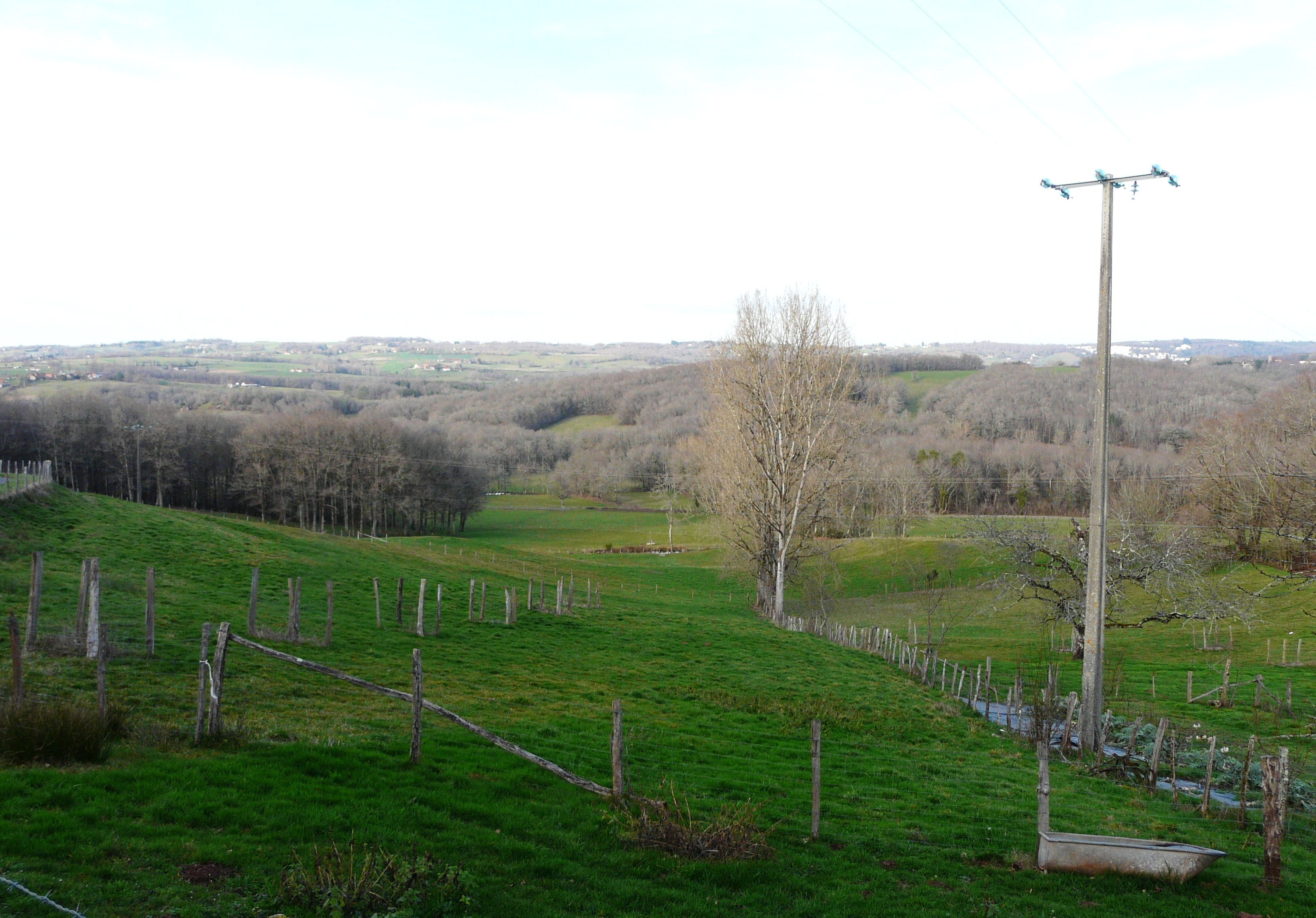 La vallée du Dalon vue depuis le bourg de Boisseuilh, Dordogne, France. Au loin, l'autre versant de la vallée se situe sur la commune de Sainte-Trie.